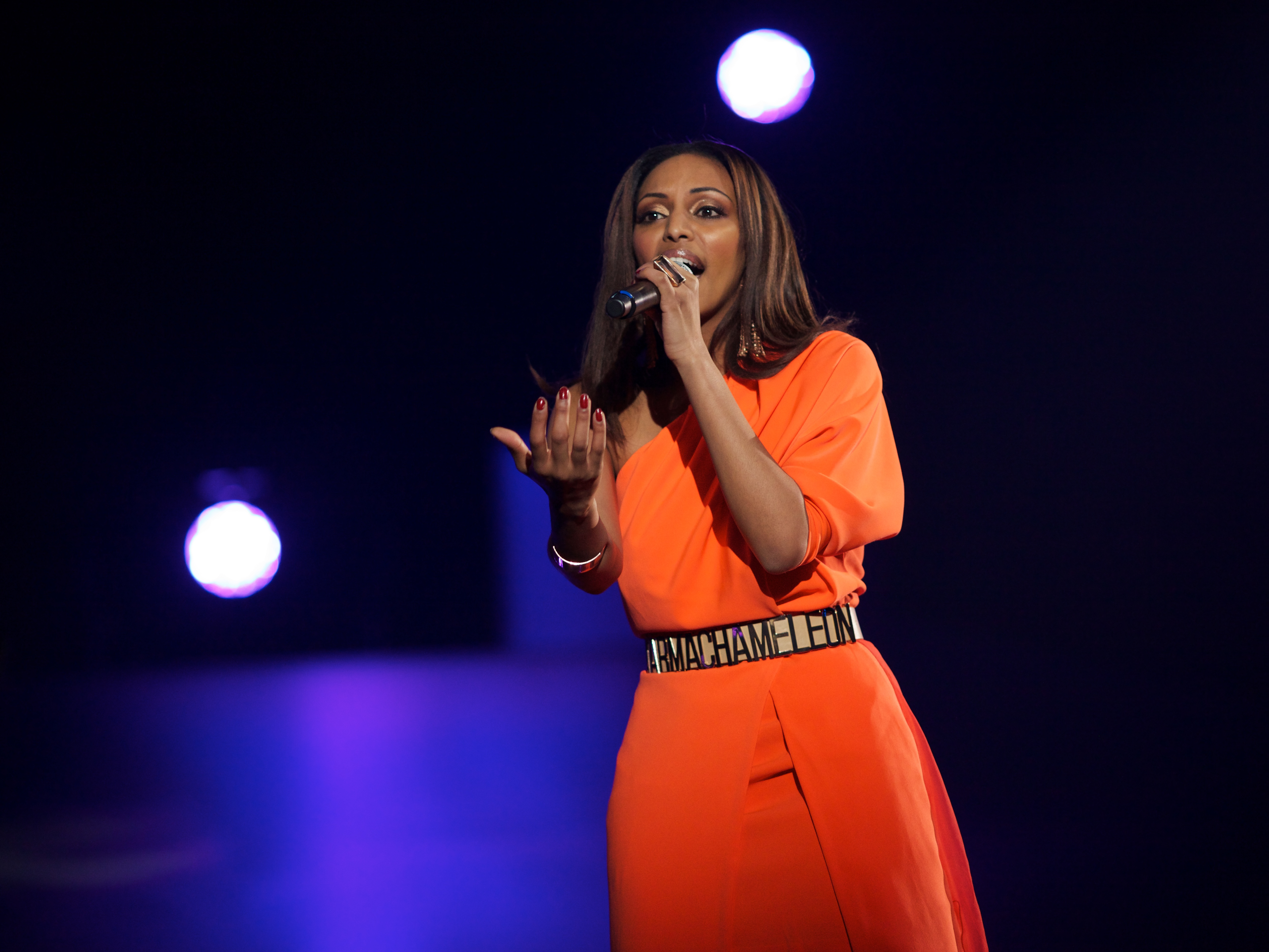 Melodi Grand Prix 2013 delfinale i Larvik